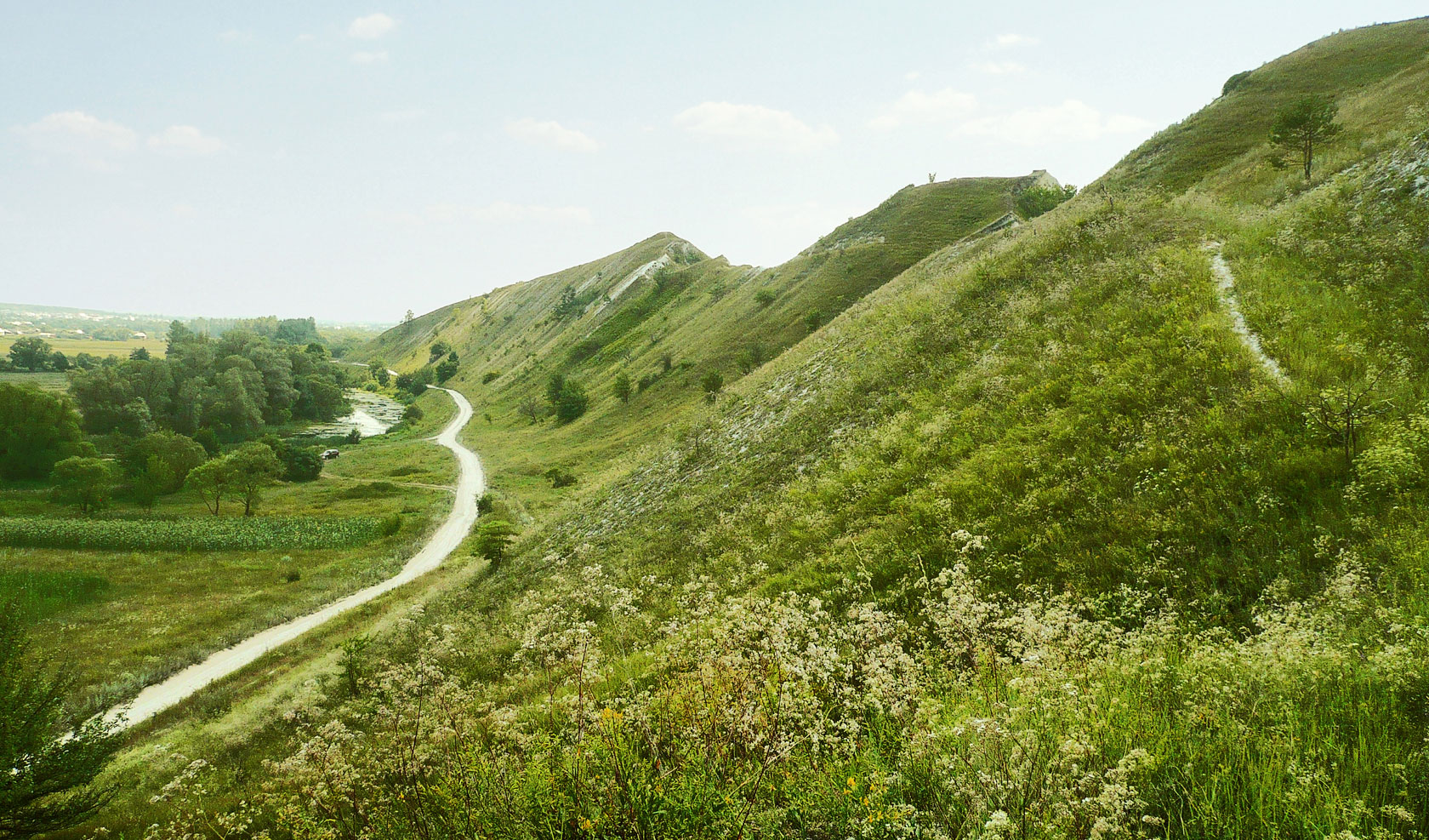 Меловой мыс, где в 12 веке северцами был построен крупный город. Берег реки Корень возле села Крапивное, Белгородская область.